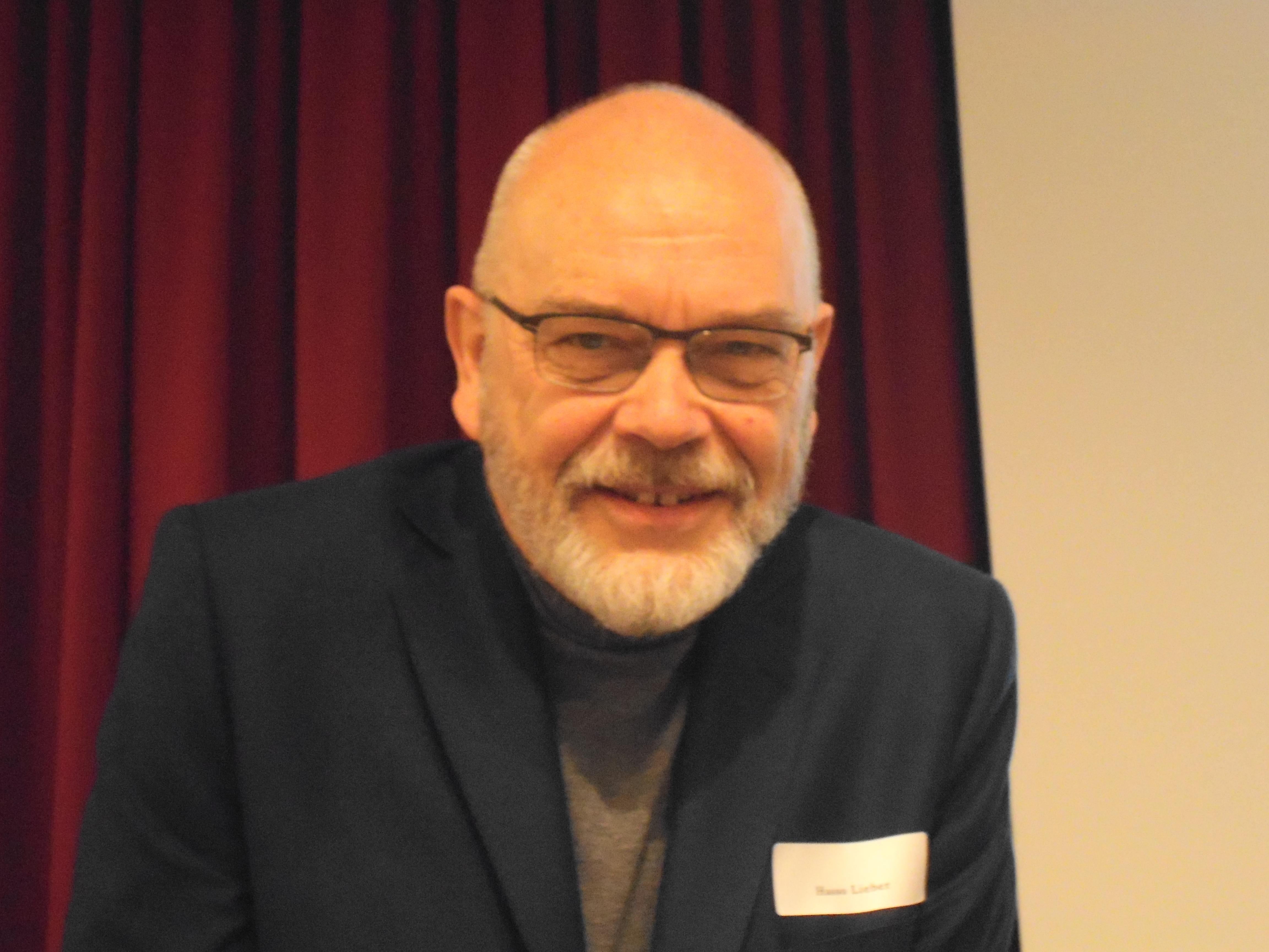 Hasso Lieber beim Schöffentag NRW 2016 in der Volkshochschule Düsseldorf am 12. November 2016.